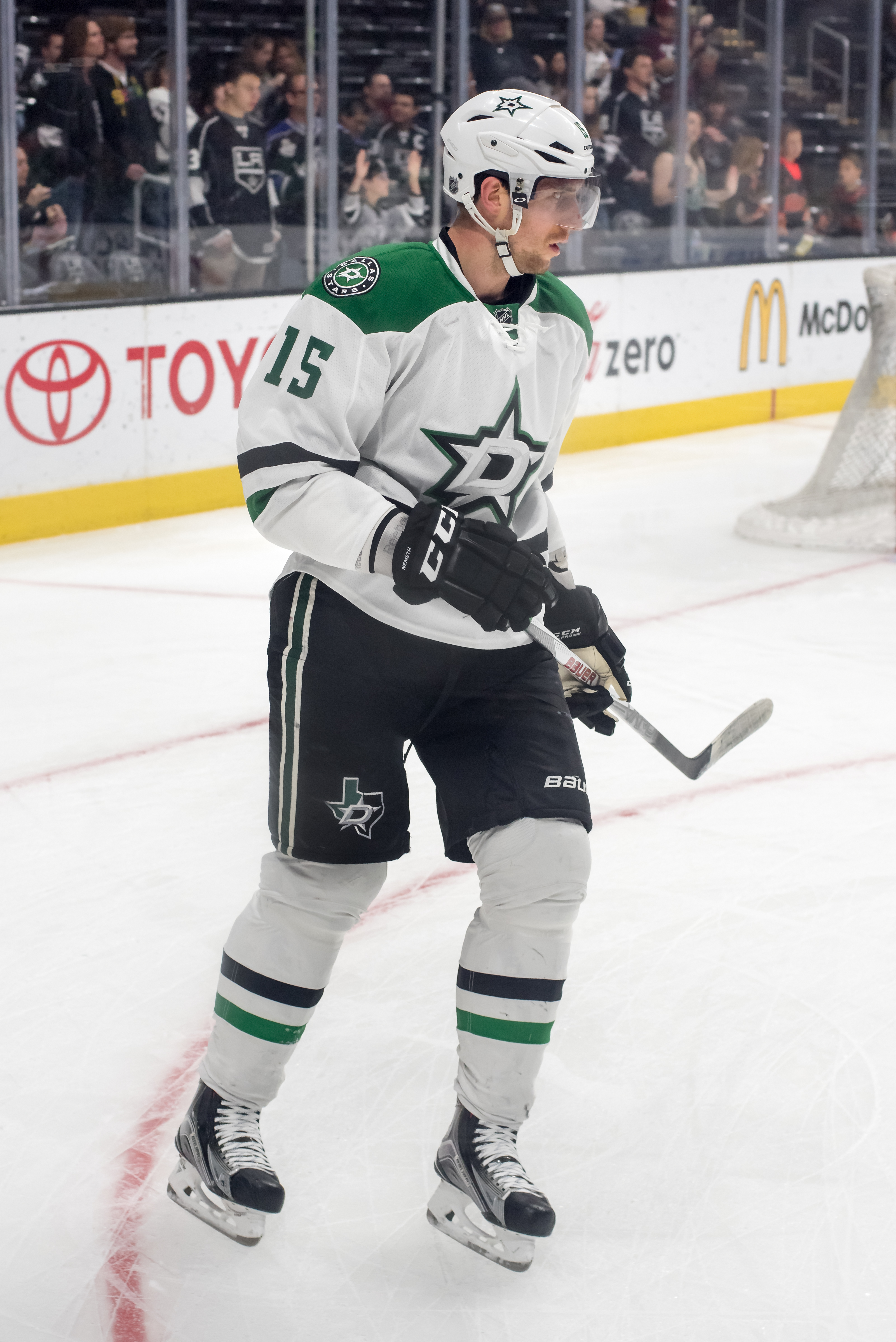 Patrik Nemeth